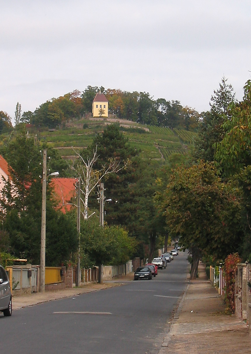 Radebeul, Minckwitzsches Weinberghaus